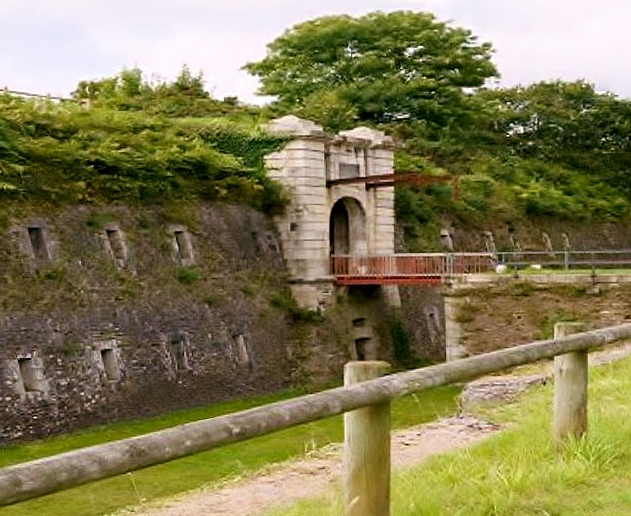 Il forte du Questel